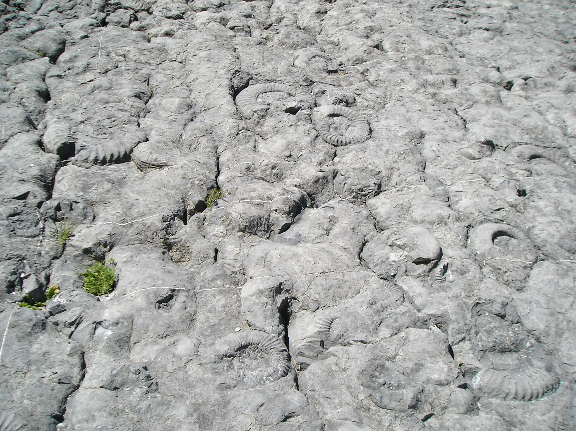 Détail de la dalle à ammonites